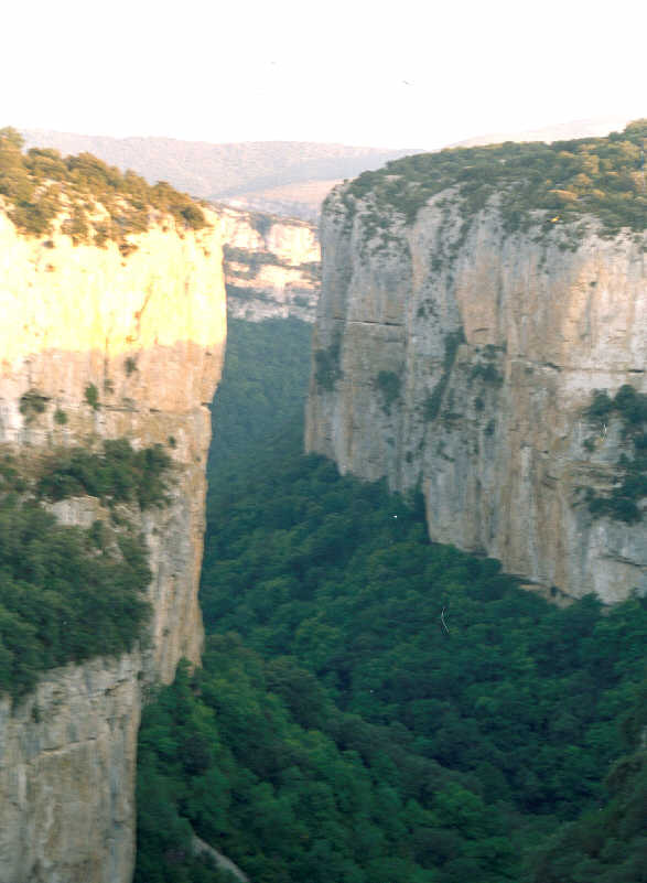 Foz de Arbayún, en la provincia de Navarra, (España). Tomada por JMSE el 9 de julio de 2003 y cedida a Wikipedia. Categoría:España (imagen) Categoría:Fotografía (imagen)